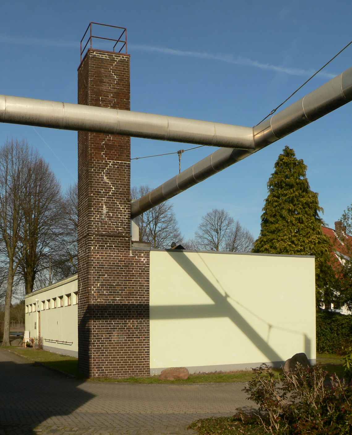 Siedlung Blumläger Feld in Celle mit abgestützten Fernwärmerohren und Otto Häsler Museum